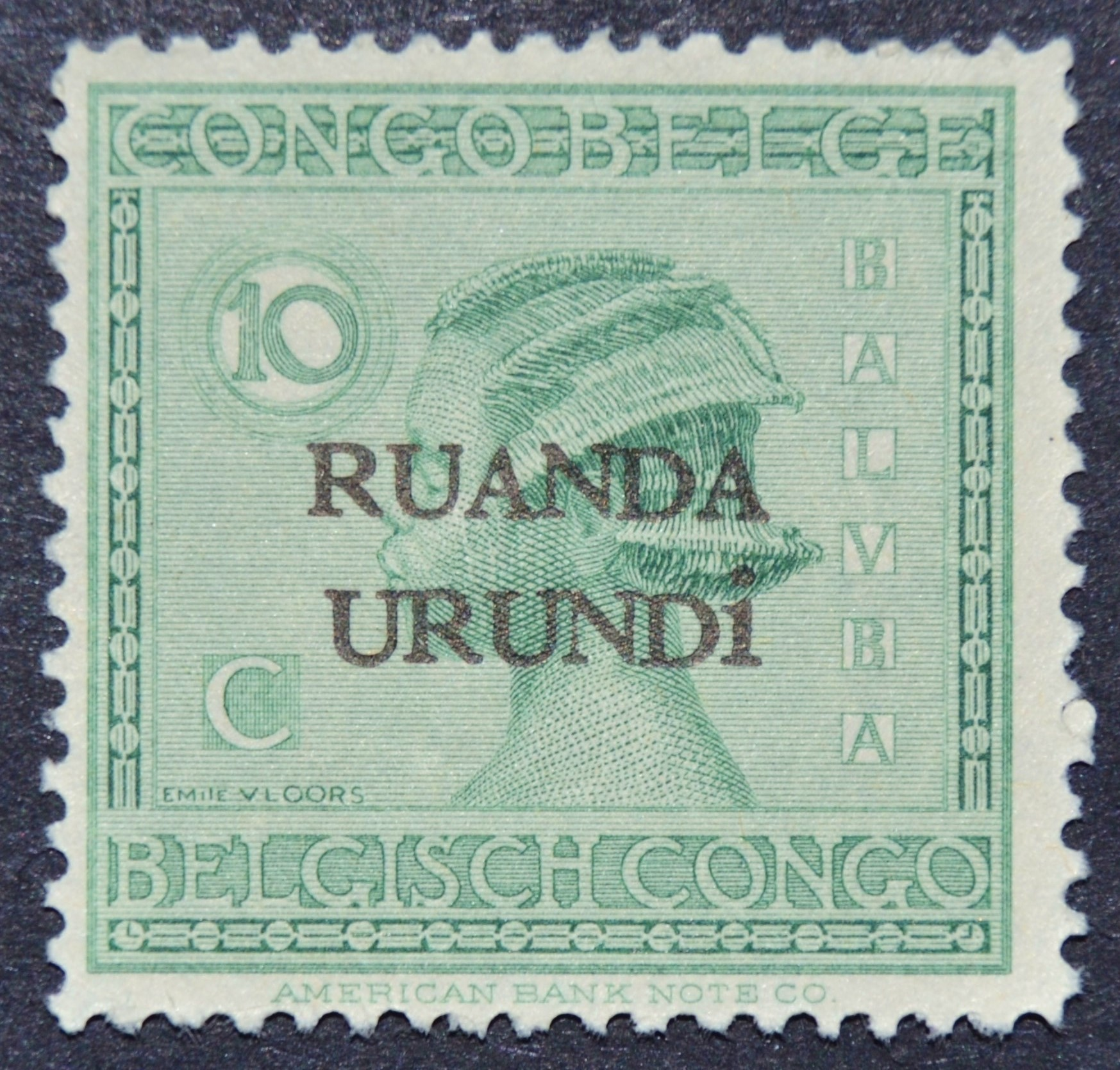 Selo com a inscrição Ruanda-Urundi, de 1924, sobre selo do Congo Belga.